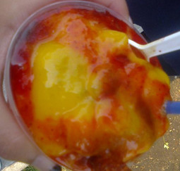 La chamoyada es una mezcla suave y refrescante de hielo, chamoy y trozos de fruta natural